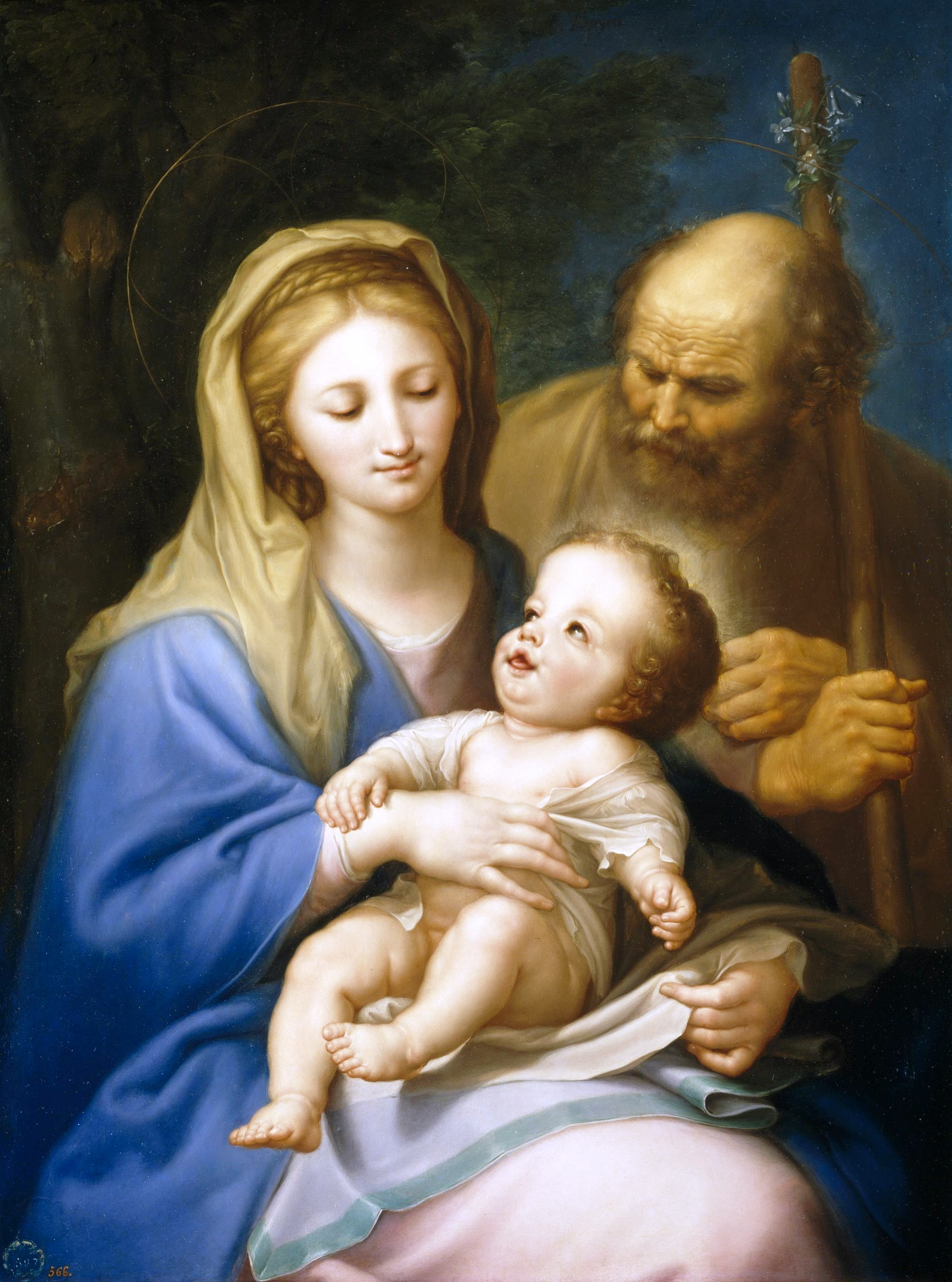 La obra representa a los tres miembros de la Sagrada Familia cristiana.